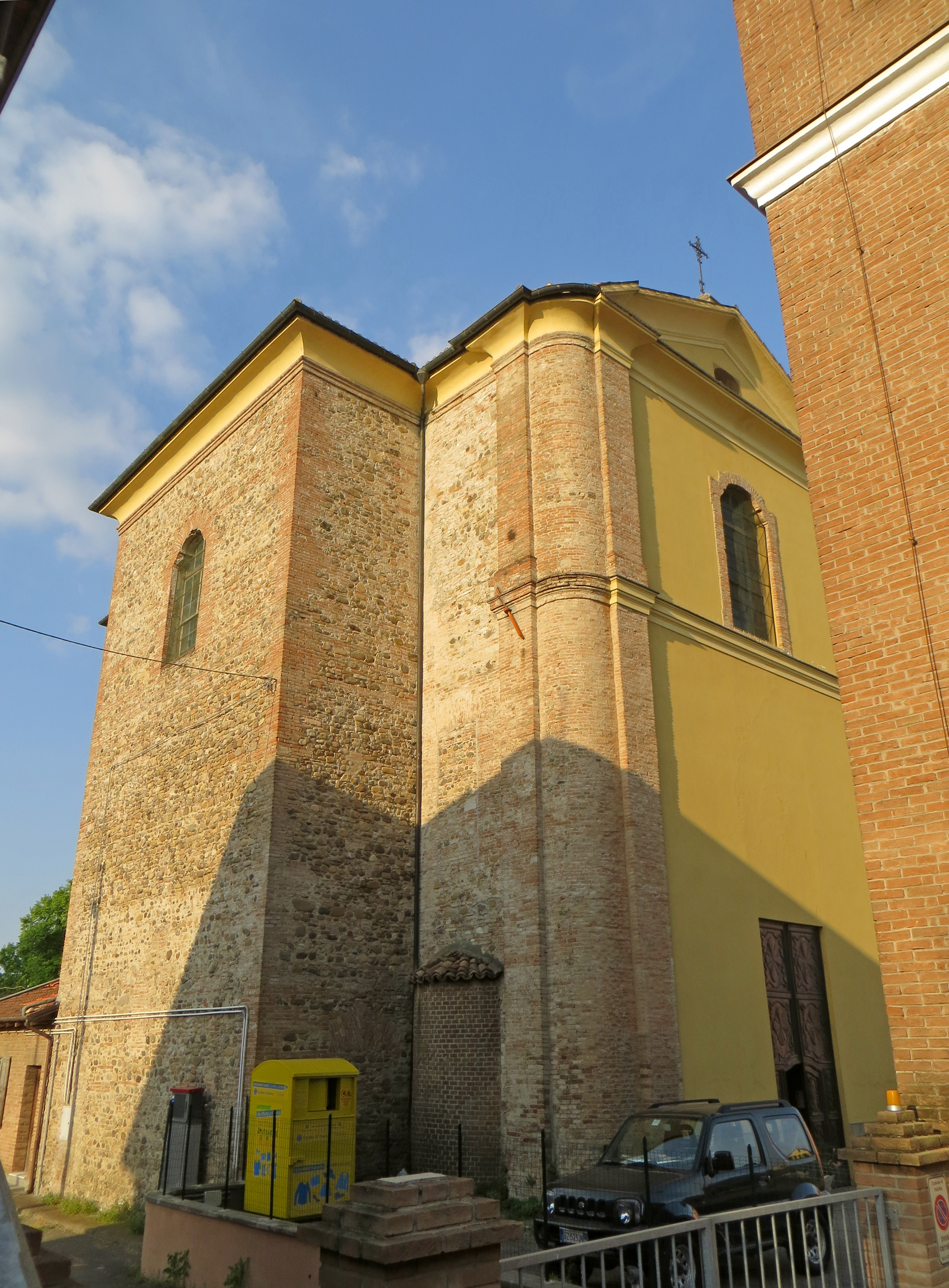 Chiesa di San Prospero (San Prospero Parmense, Parma) - facciata e lato ovest